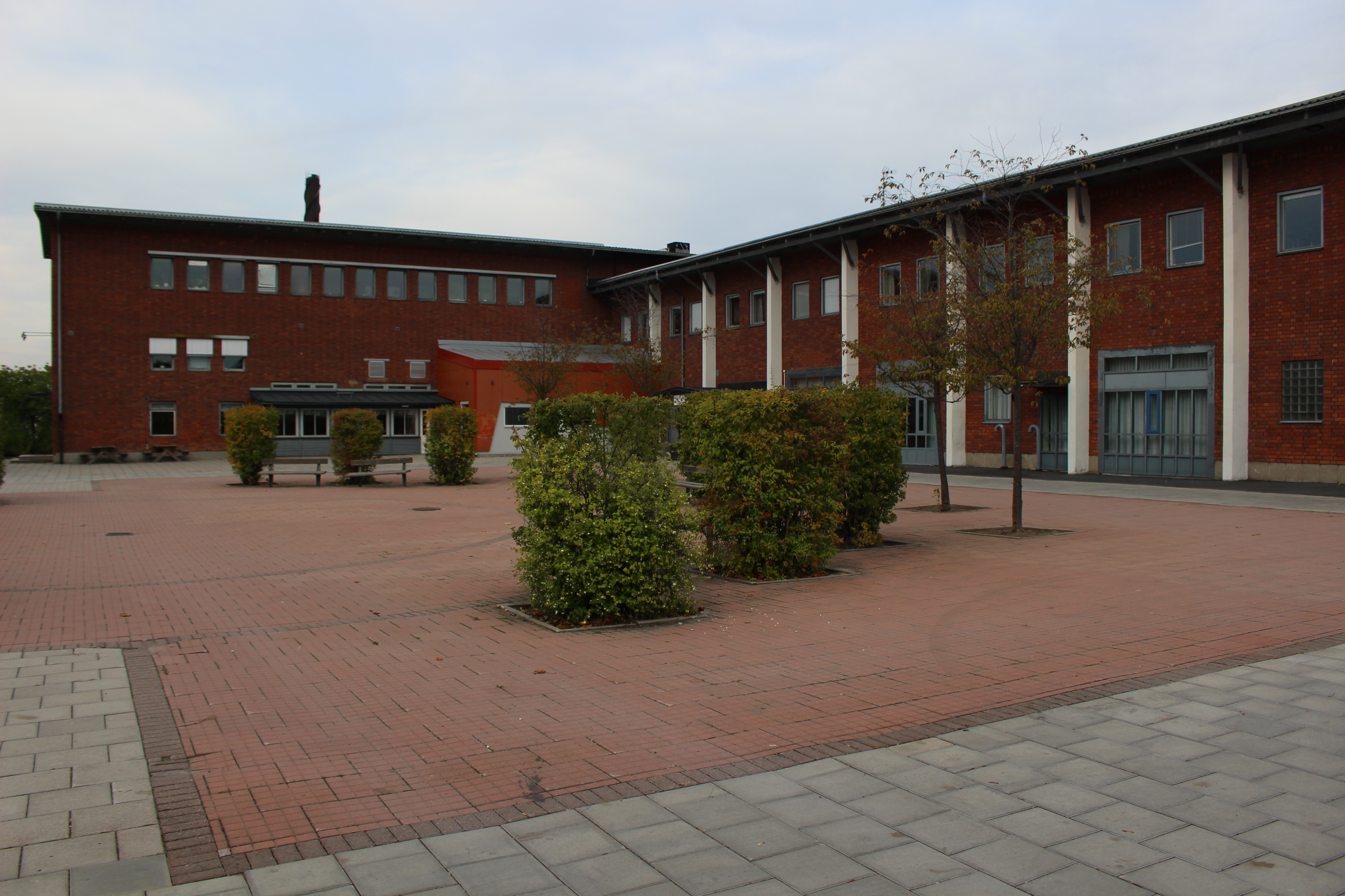 Vallentuna gymnasium från sydväst.